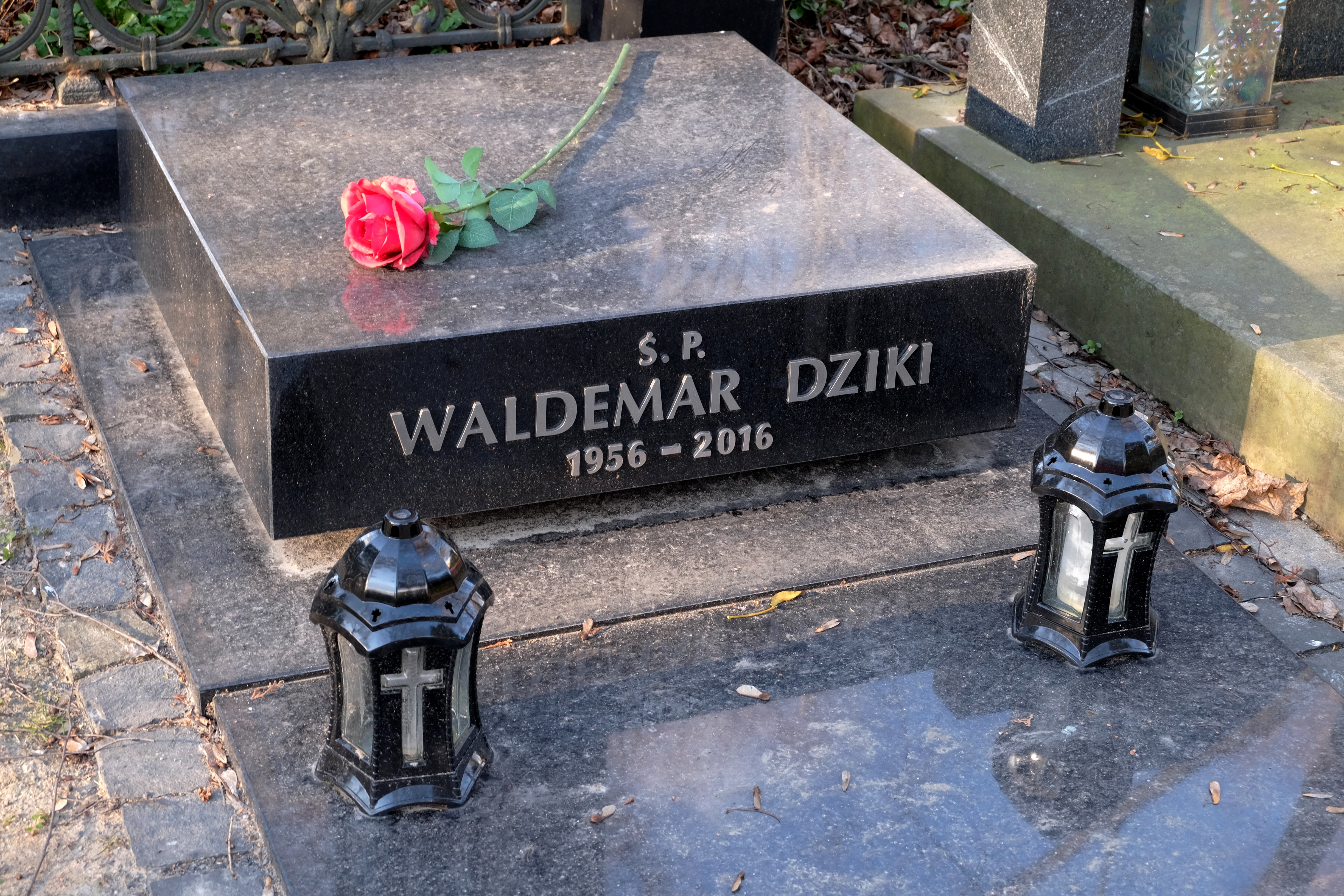 Grób reżysera i producenta filmowego Waldemara Dzikiego na cmentarzu ewangelicko-reformowanym przy ul. Żytniej w Warszawie